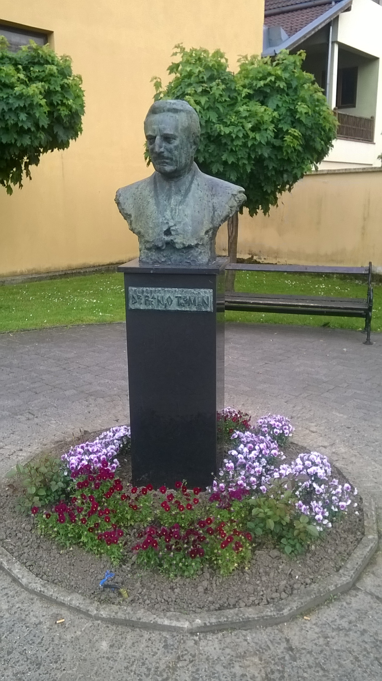 Franju Tudman Denkmal, Pakrac